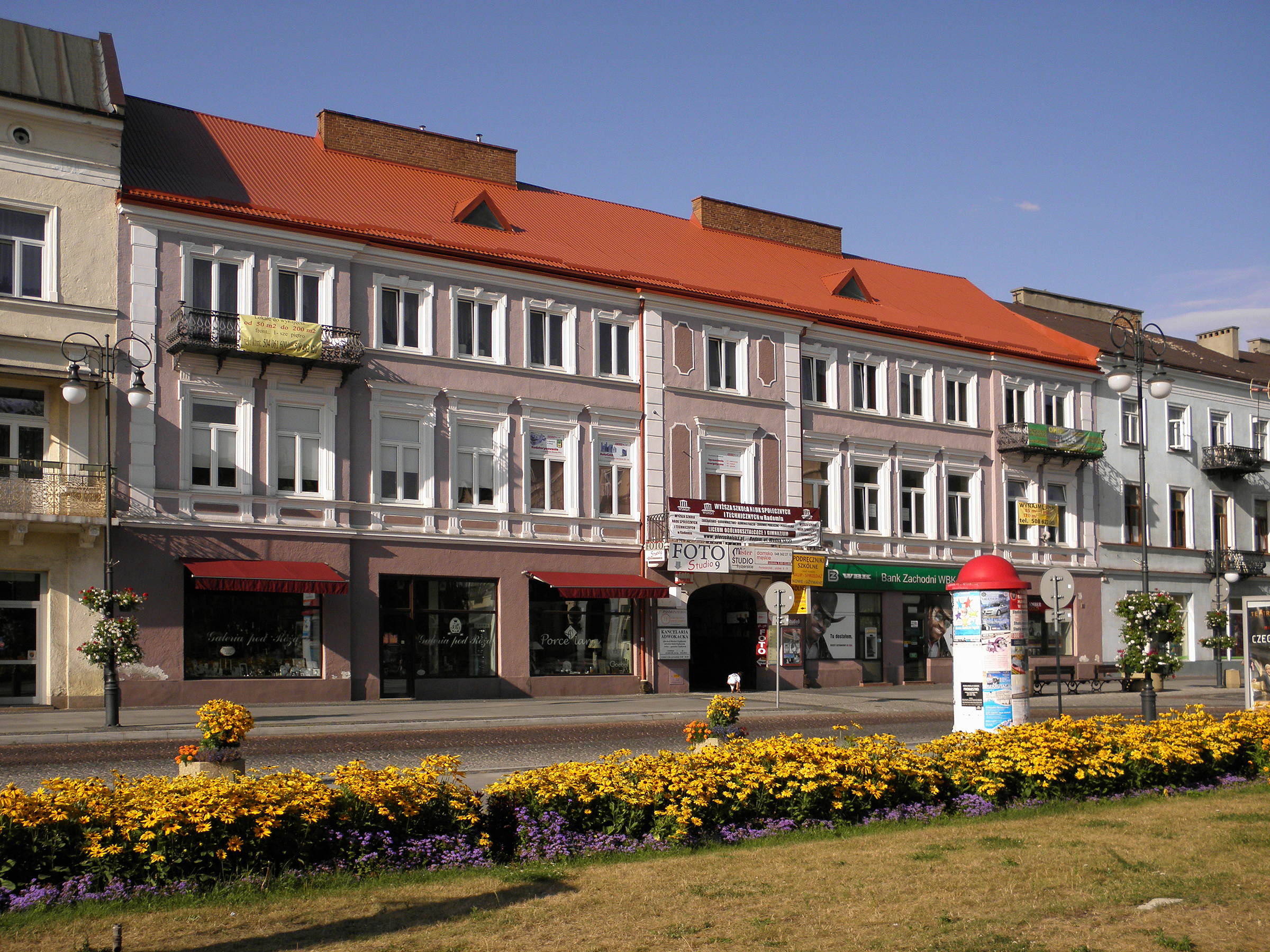 Radom - kamienica przy ul.Żeromskiego 9.